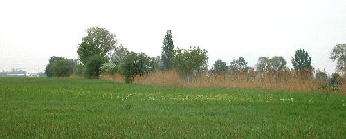 Überdeckter Niedermoorbereich mit Schilf- und Buschvegetation. Lebensraum für juvenile und adulte Laubfrösche (Reifehabitat und Nahrungshabitat).